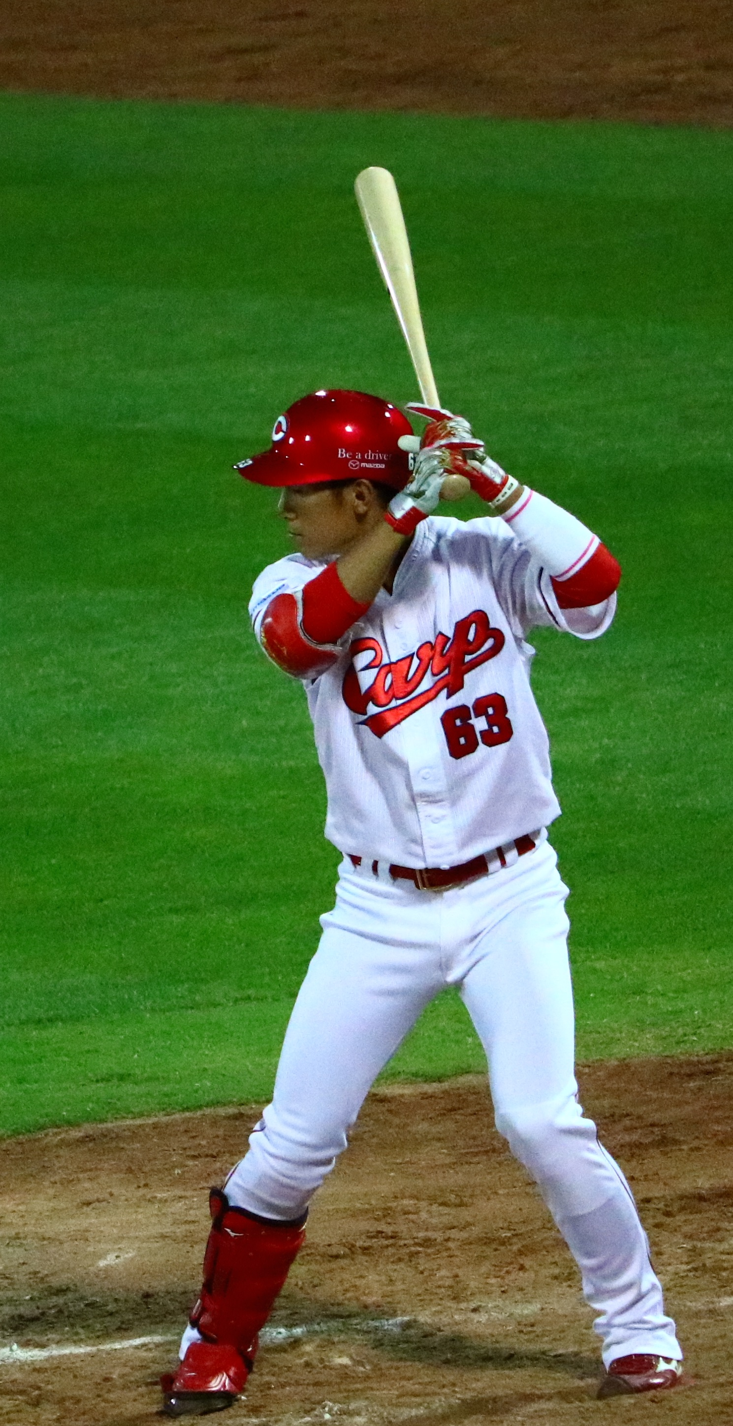 打席での西川(2017/6/15 MAZDA Zoom-Zoomスタジアム広島)